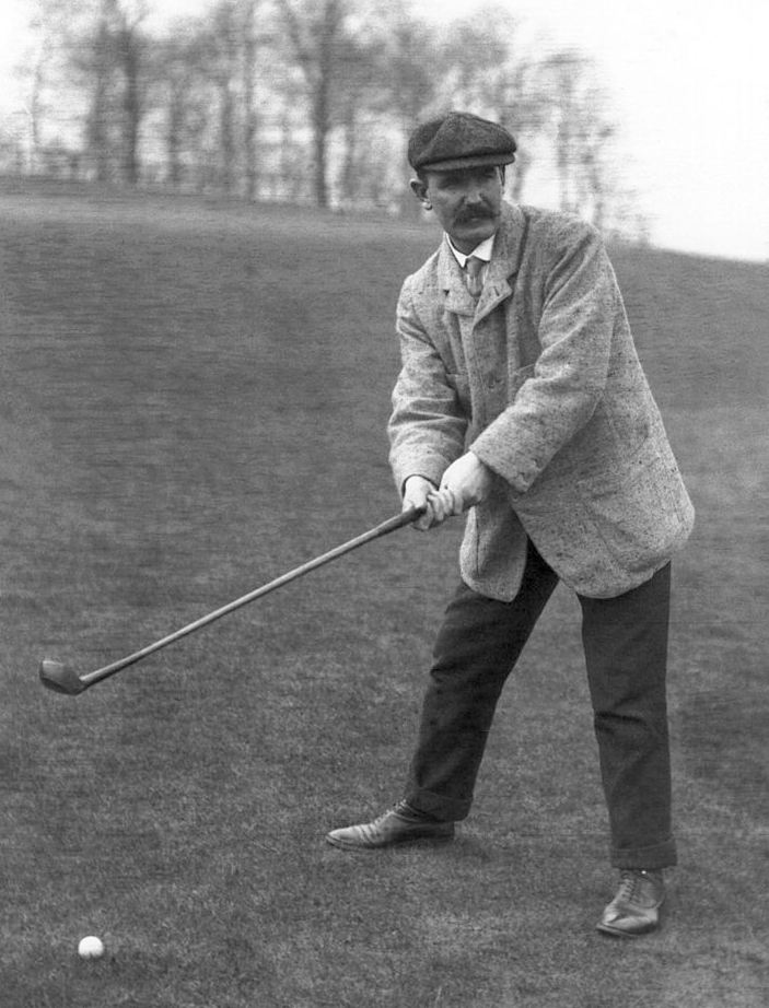 Alex Herd